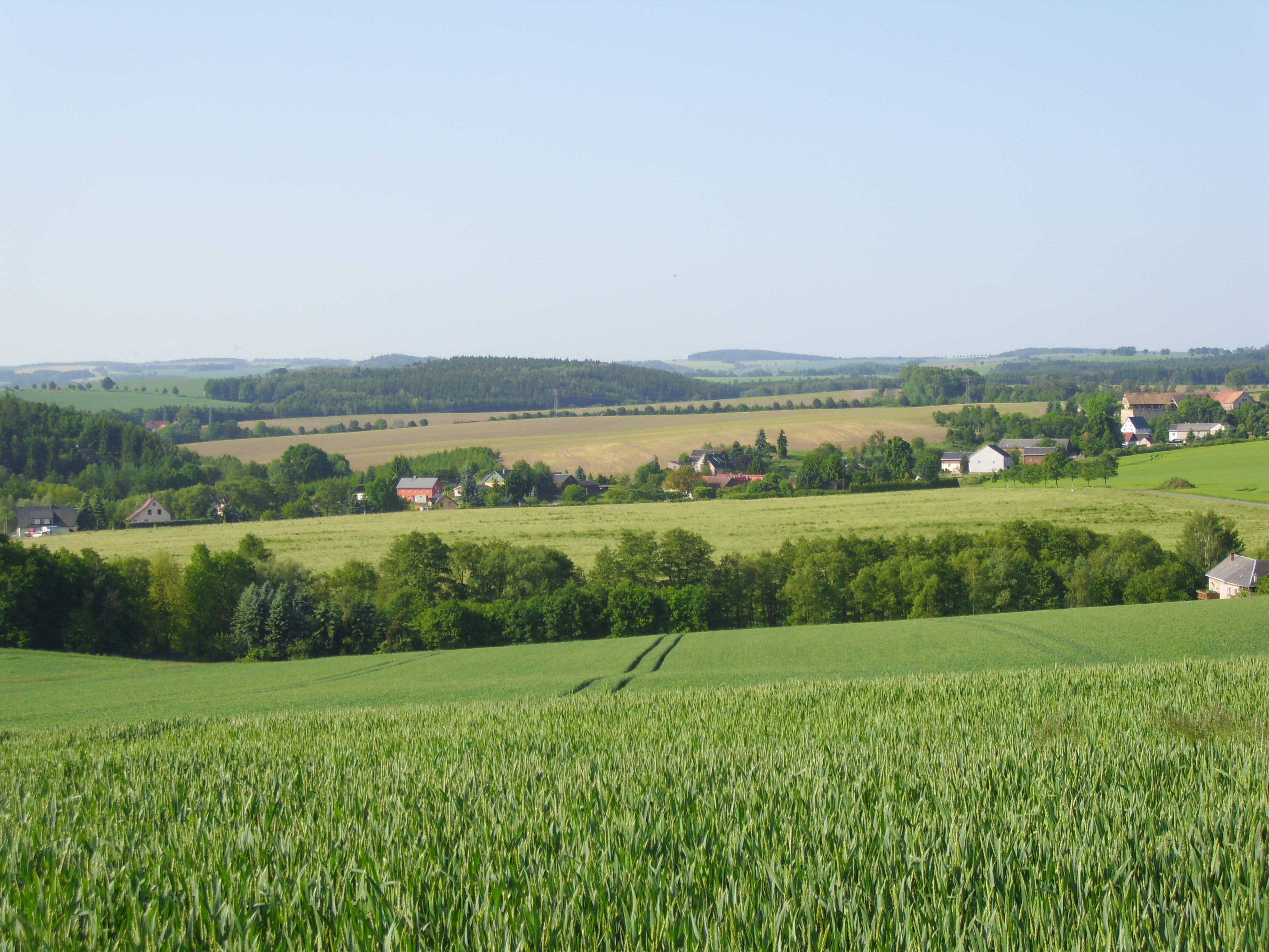 Vom Wildsteig in Seifersorf blickend auf den Alten Ortskern von Paulsdorf, mit der alten Schäferei am Oberen Ende.